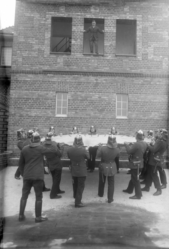 Einen Tag bei der Berliner Feuerwehr! Berliner Feuerwehr beim Ueben mit dem Sprungtuch am Uebungsturm.